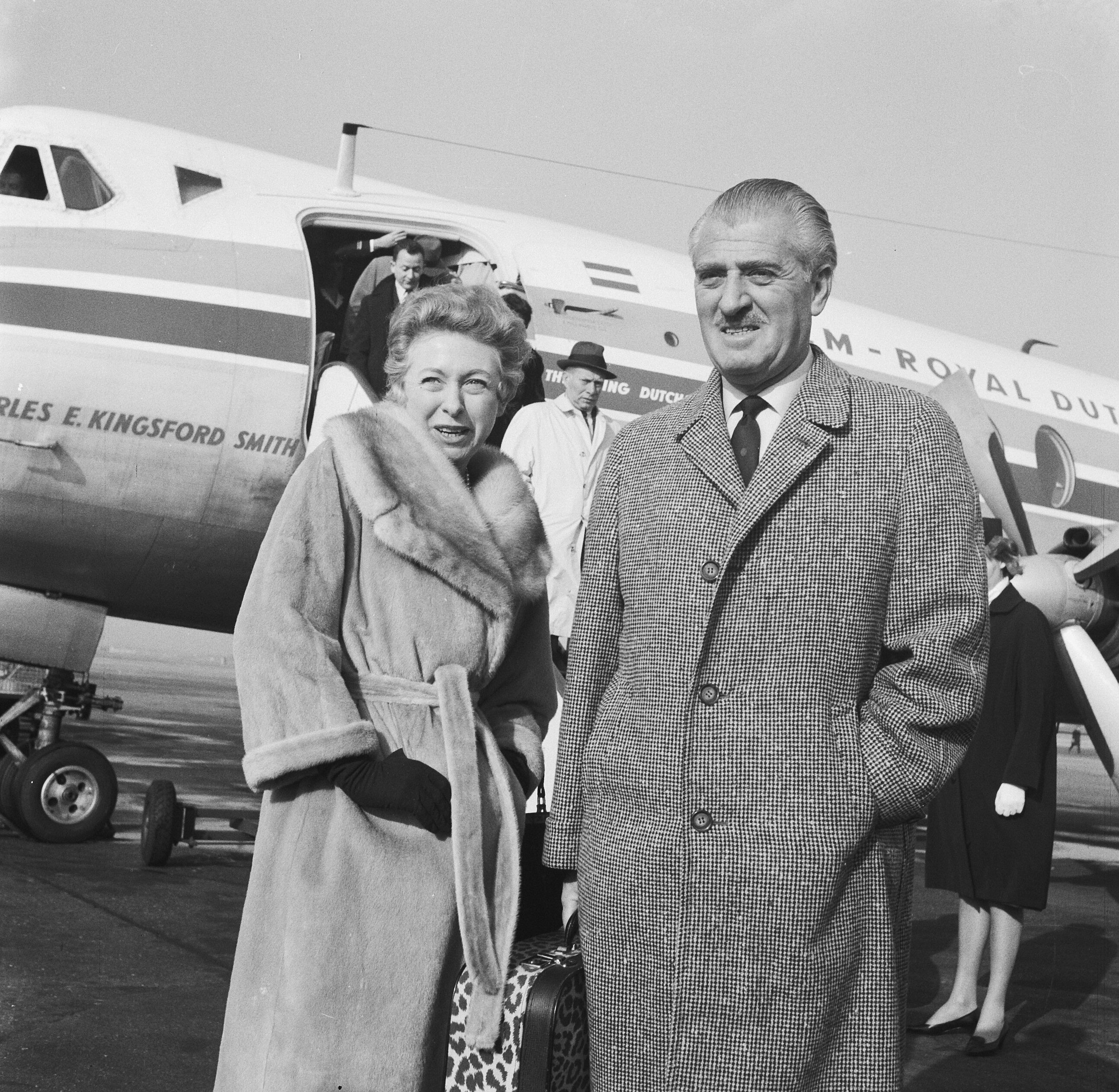 Collectie / Archief : Fotocollectie Anefo Reportage / Serie : [ onbekend ] Beschrijving : De zangeres Patachou in Nederland om op te treden in programma Domino van de AVRO Annotatie : Naast Patachou (Henriette Ragon) haar echtgenoot Arthur Lesser Datum : 1 november 1962 Locatie : Schiphol Trefwoorden : vliegvelden, zangeressen, zangers Persoonsnaam : Patachou Instellingsnaam : AVRO Fotograaf : Nijs, Jac. de / Anefo Auteursrechthebbende : Nationaal Archief Materiaalsoort : Negatief (zwart/wit) Nummer archiefinventaris : bekijk toegang 2.24.01.03 Bestanddeelnummer : 914-4703